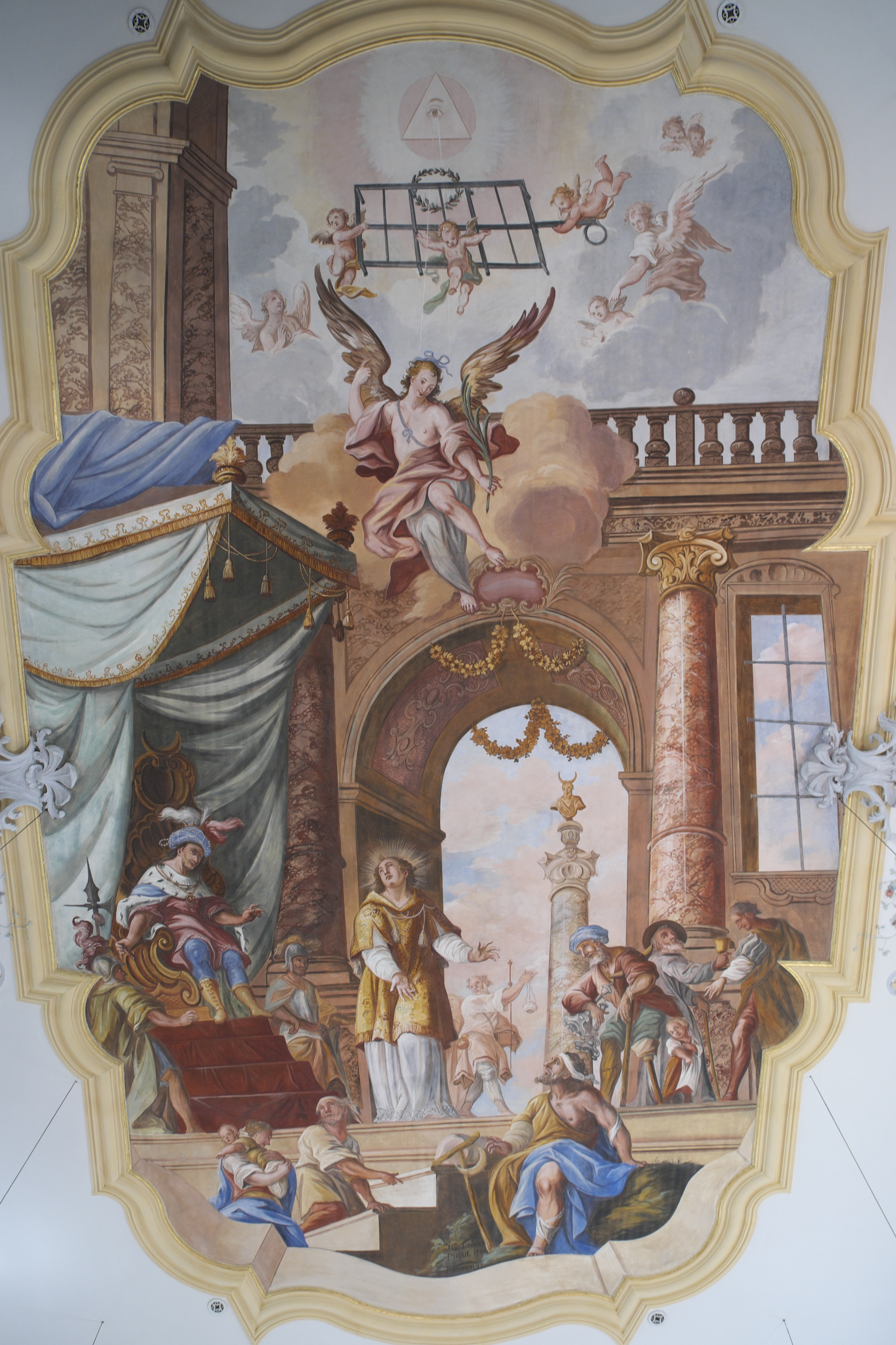 Katholische Pfarrkirche St. Laurentius in Reinhartshausen (Bobingen) im schwäbischen Landkreis Augsburg (Bayern/Deutschland), Stuckdekor nach Entwurf von Franz Xaver Feuchtmayer dem Älteren, von 1742; Fresken von Johann Georg Leederer, von 1742; heiliger Laurentius vor Gericht